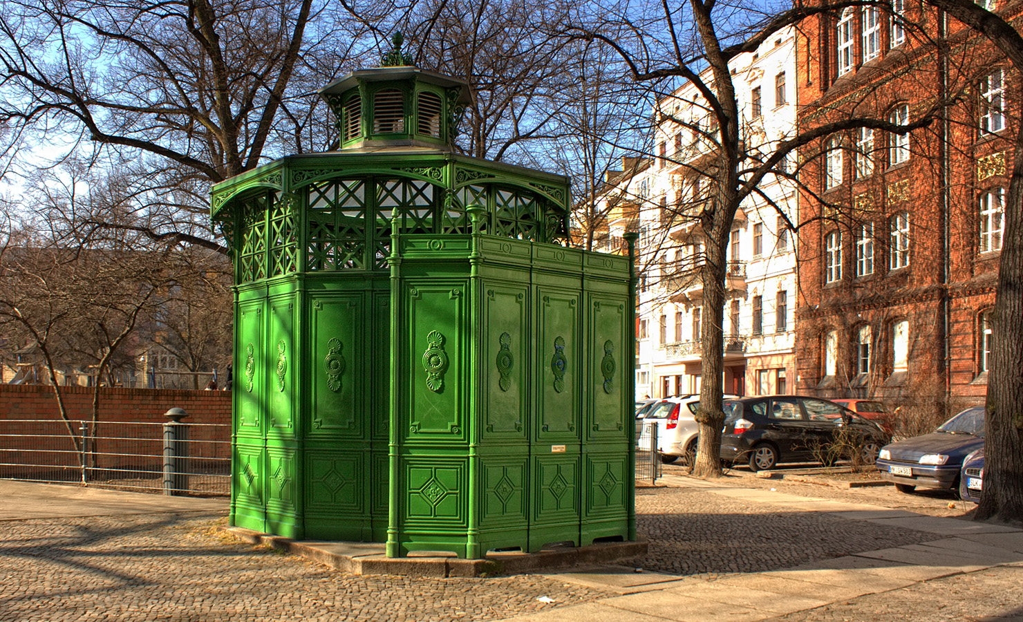 Pissoir